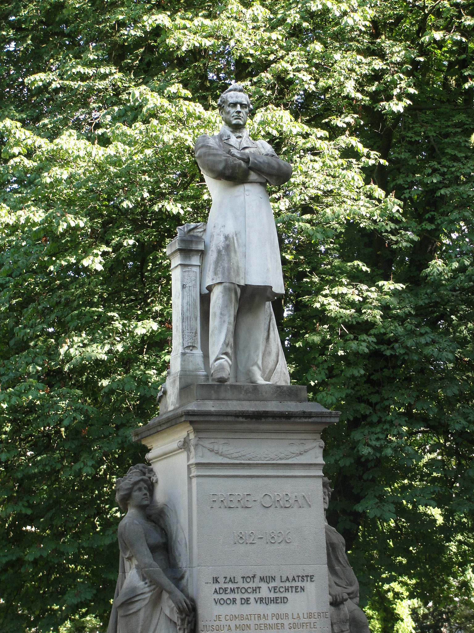 Standbeeld van Walthère Frère-Orban, door beeldhouwer Charles Samuel, onthuld in 1900. Frère-Orbansquare, Leopoldwijk, Brussel.